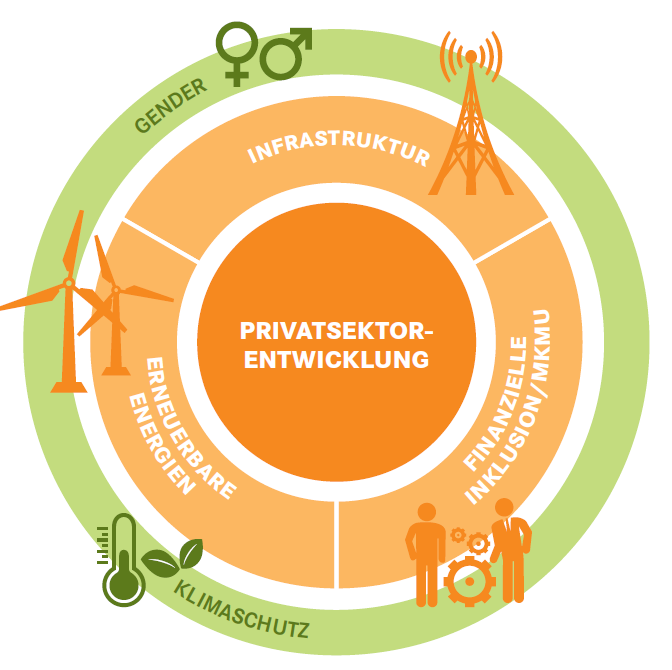 Schwerpunkt- und Querschnittsthemen der OeEB - bessere Qualität